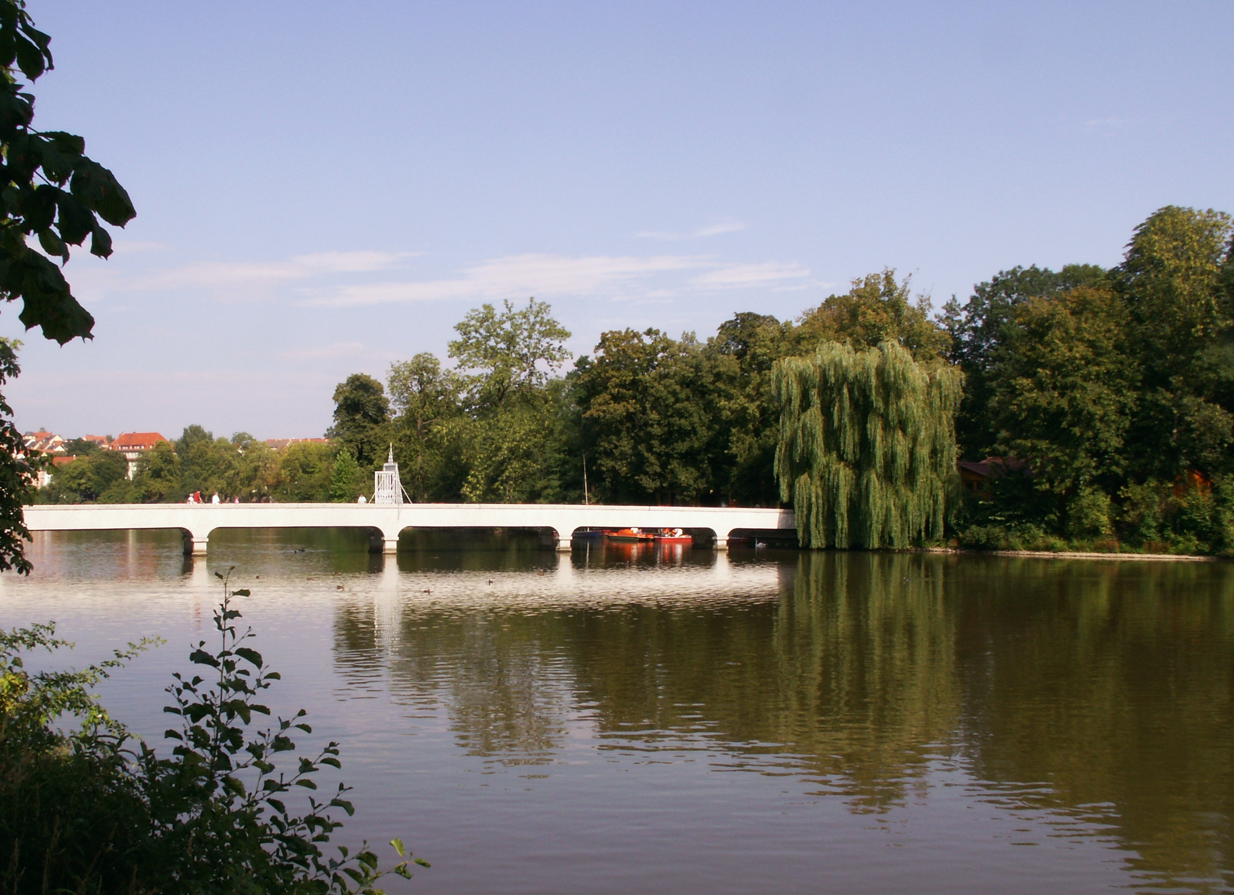 Altenburg Brücke zur Insel im Großen Teich Foto 2006 Wolfgang Pehlemann Wiesbaden PICT0300